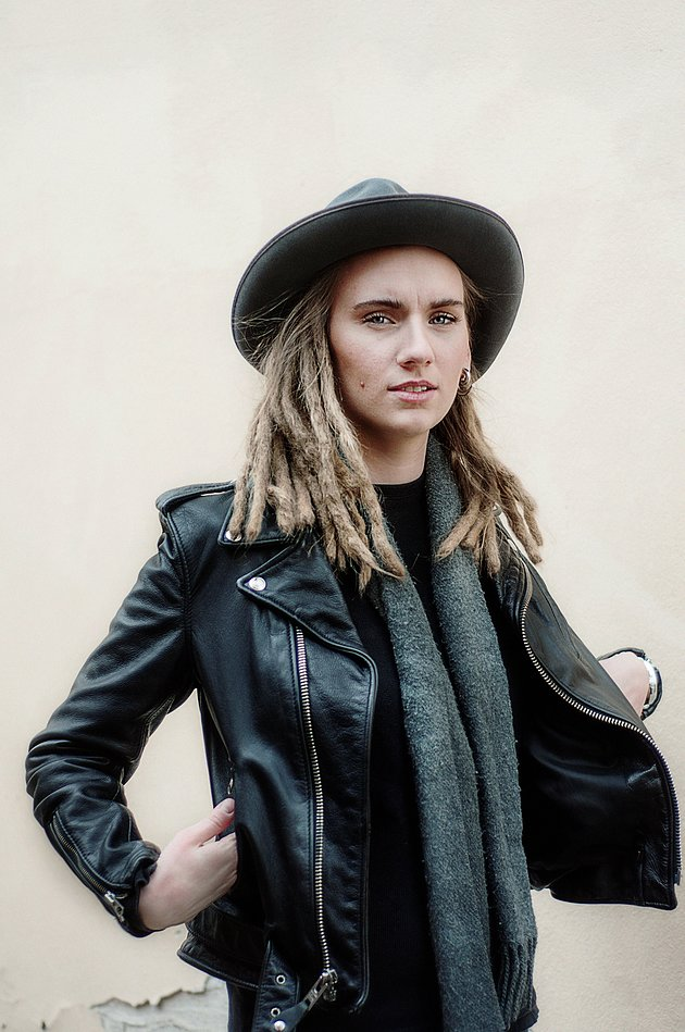 Pressbild på Moa Lignell 2018